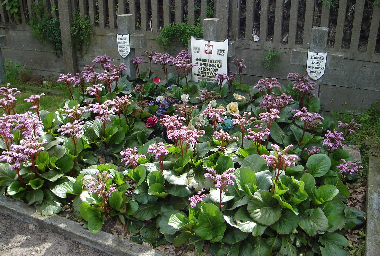 Cmentarz w Młodzieszynie - groby żołnierzy 7 Pułku Strzelców Konnych poległych we wrześniu 1939 w Bitwie nad Bzurą